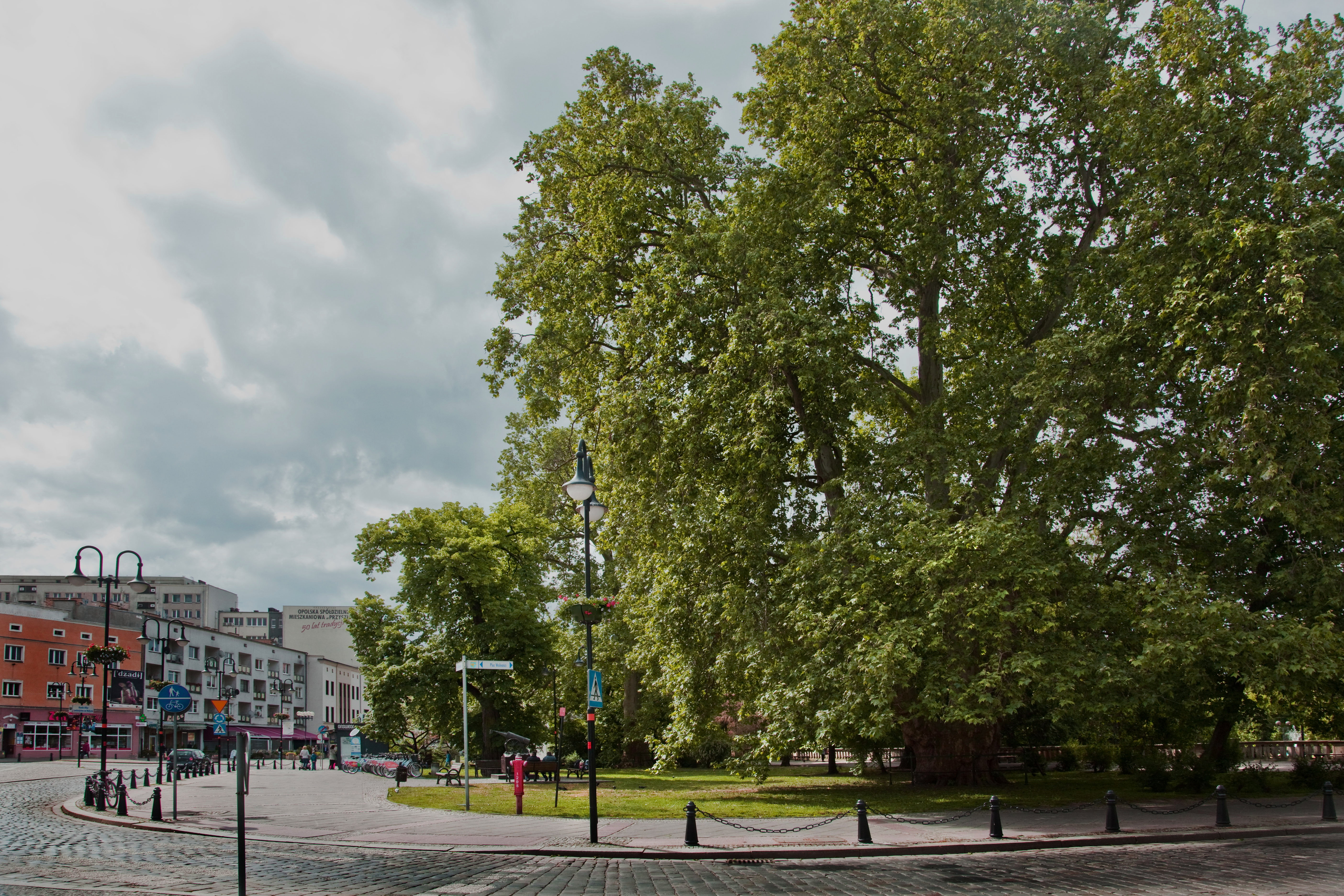 Platan klonolistny (Platanus acerifolia) na Placu Wolności w Opolu. Dz. Urz. Woj. Opolskiego z dnia 28 czerwca 2001r. Nr 56, poz.418 This photograph shows a natural monument of Poland registered under number 526 (list)